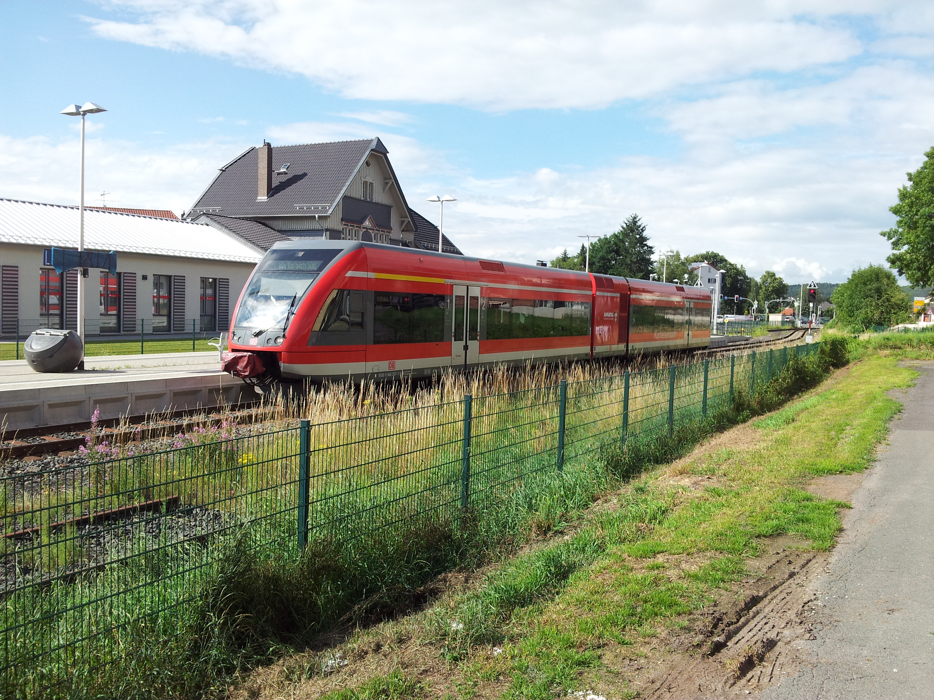 Dieseltriebwagen der DB-Baureihe 646 (Stadler GTW 2-6) beim Halt im Volkmarsener Bahnhof